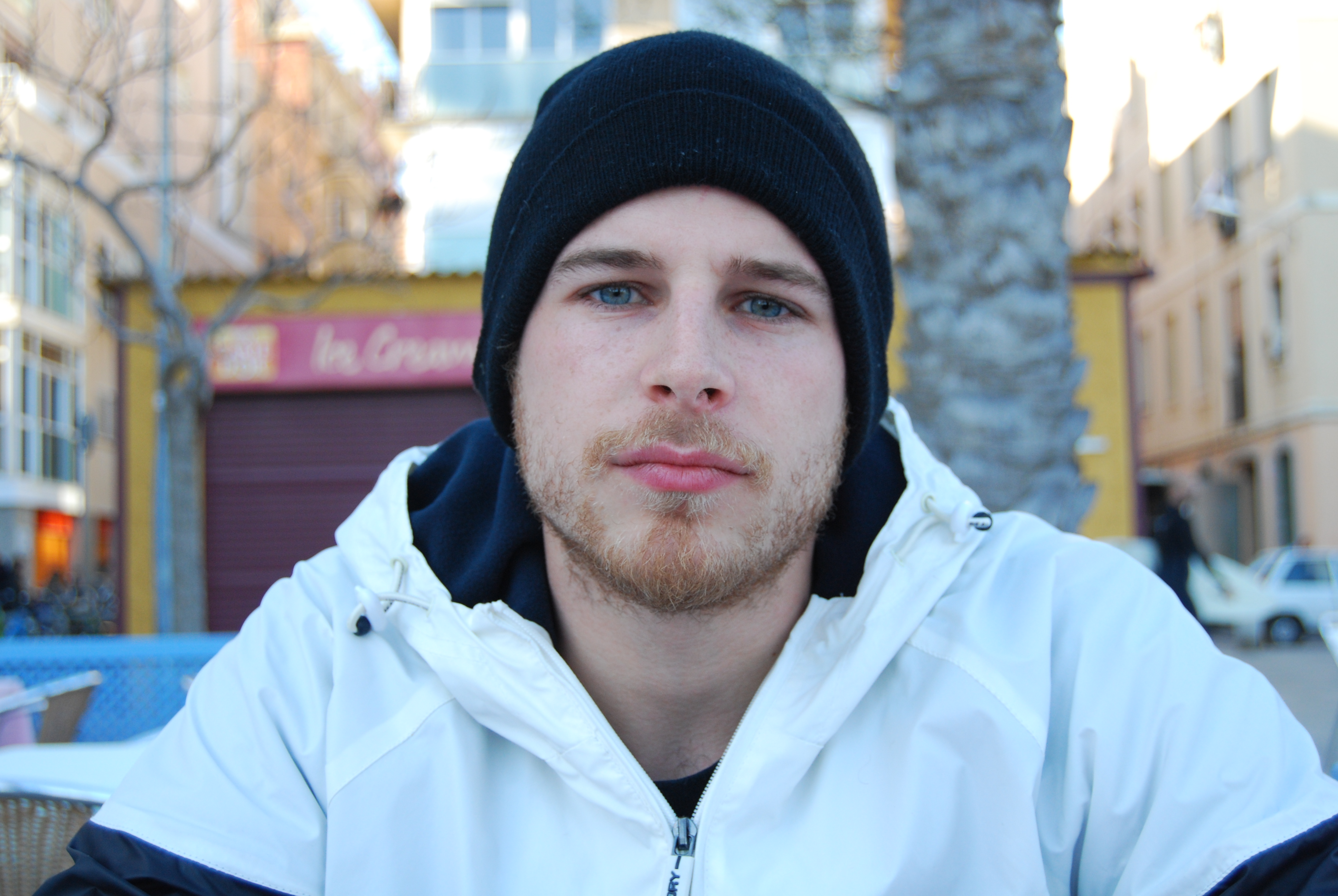 Álvaro Cervantes durante el rodaje de El sexo de los ángeles